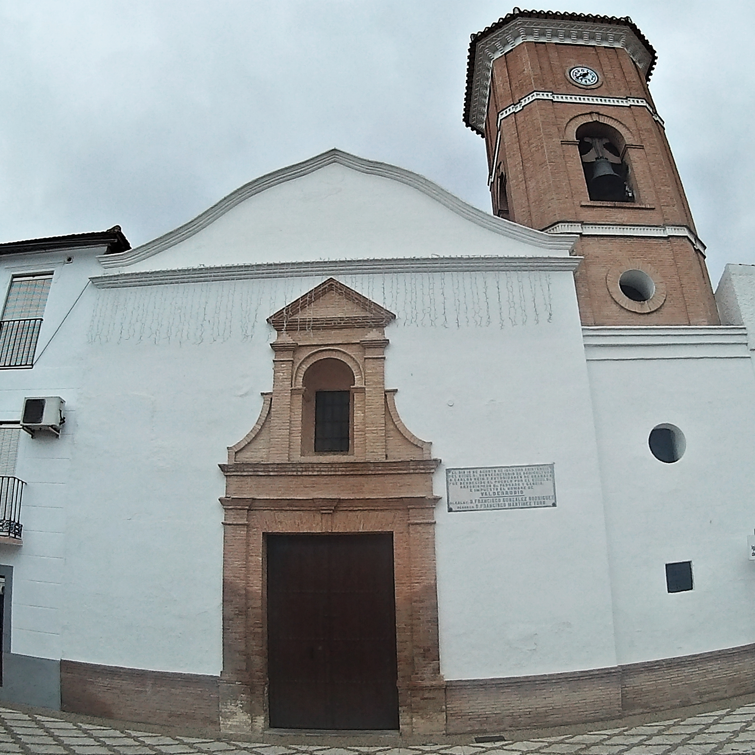 Valderrubio